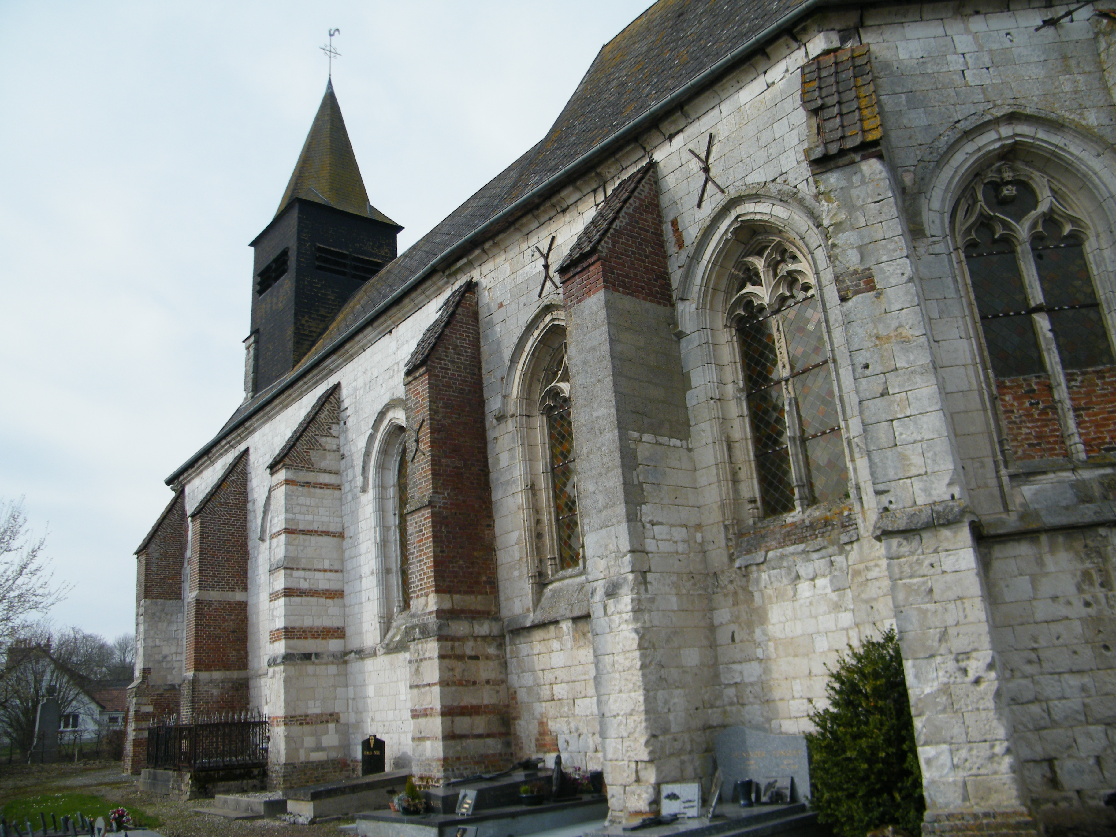 L'église.